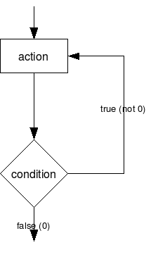 C language example. Illustrates do-while control statement.